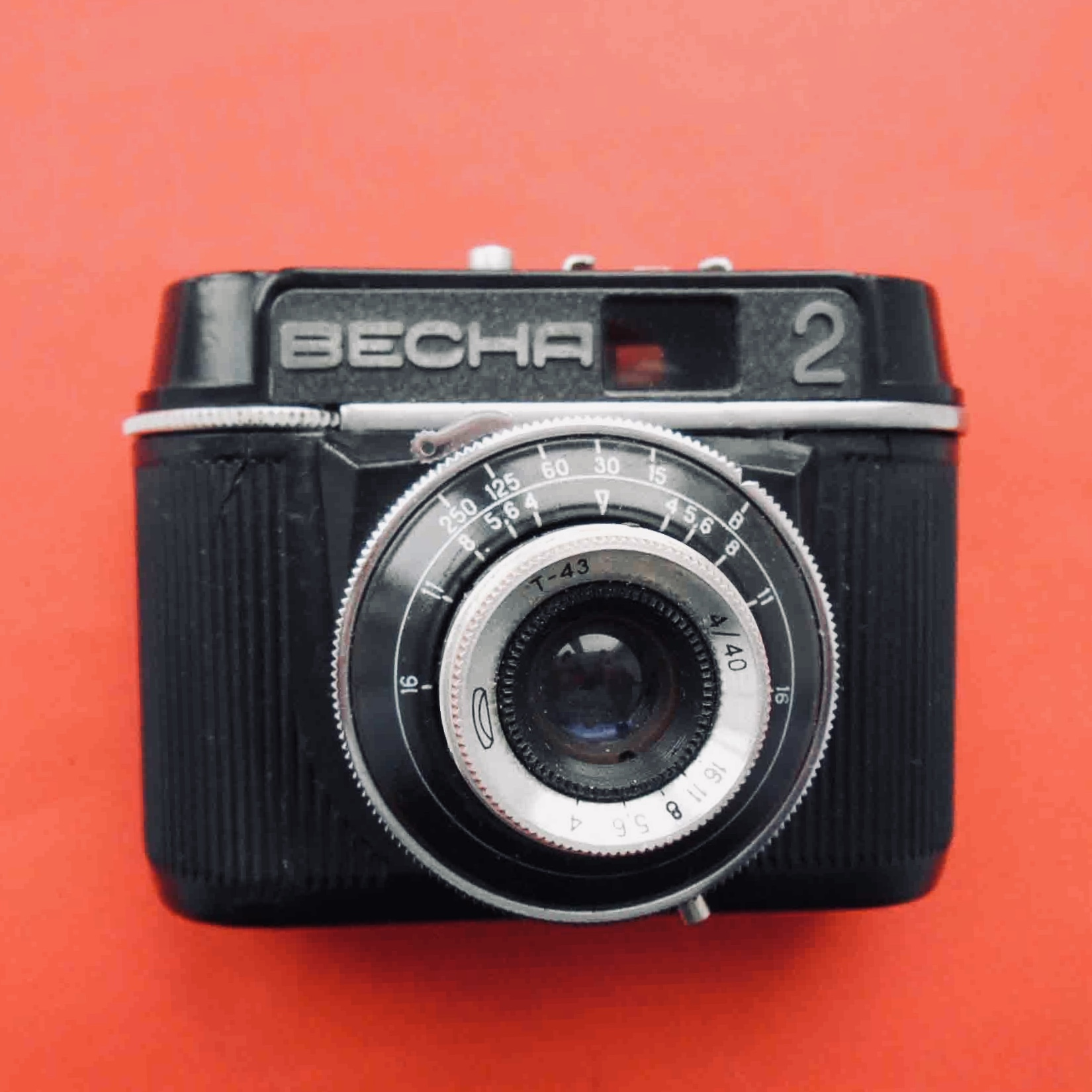 Советский фотоаппарат Весна-2